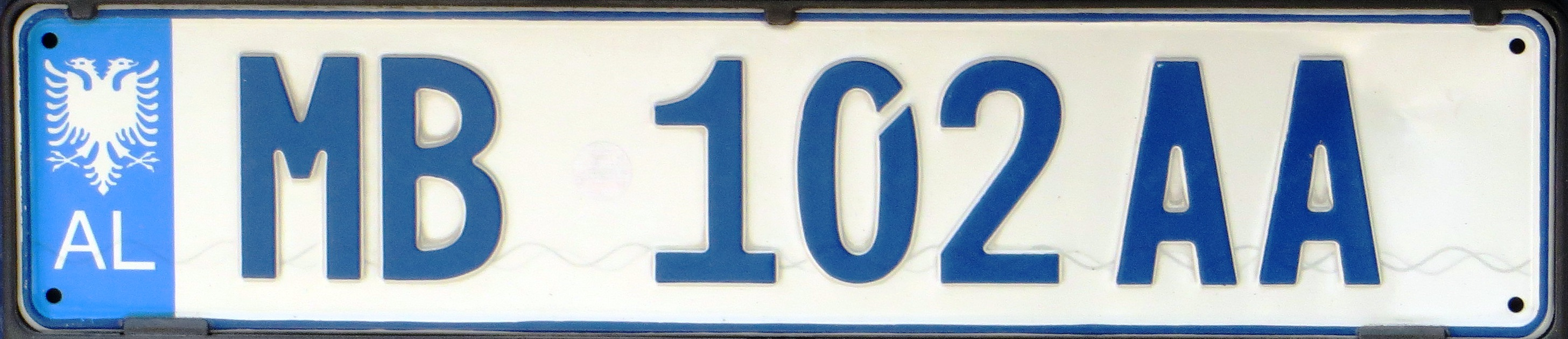 Nieuwe politie kenteken plaat Albanië